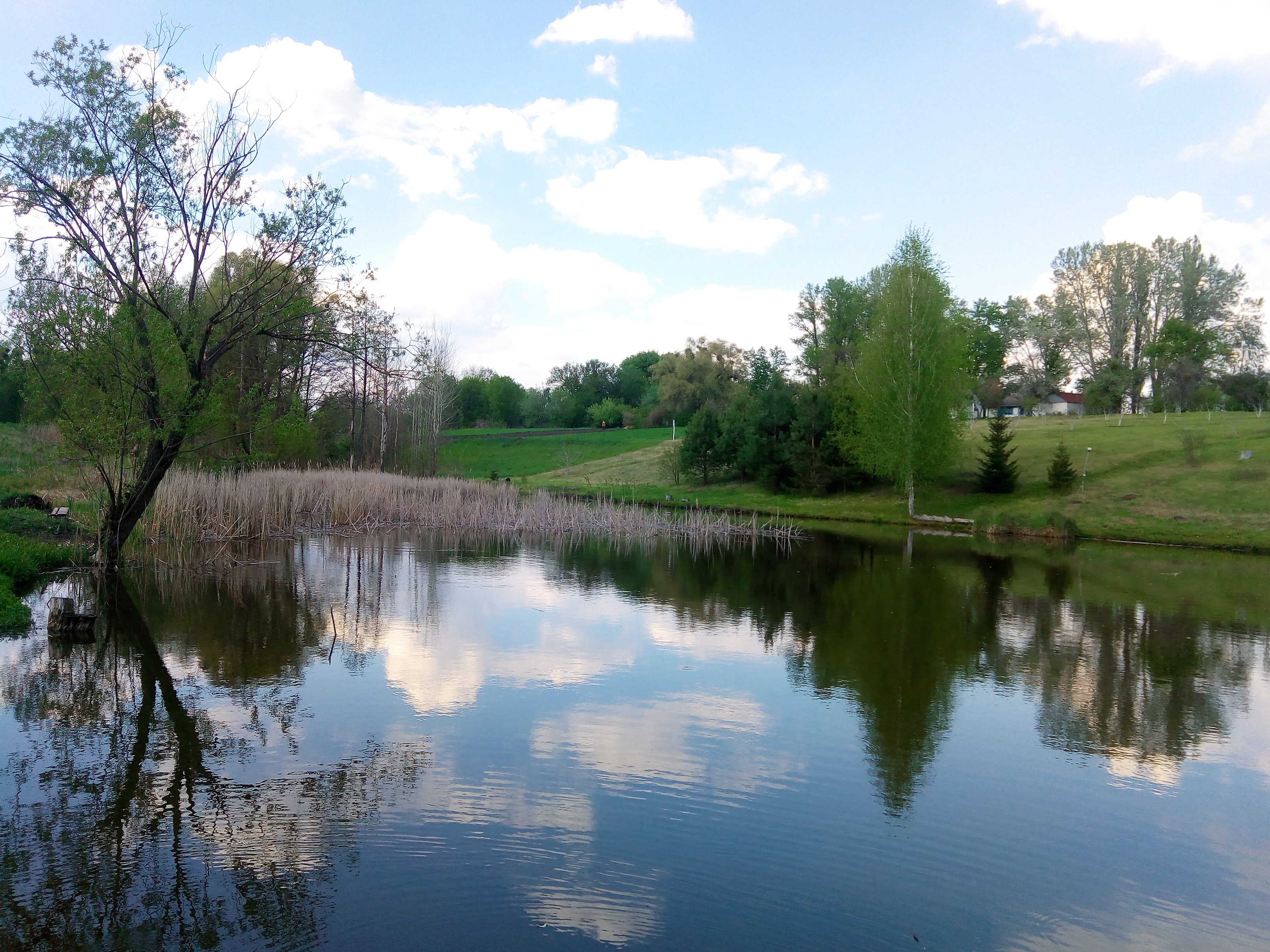 Природа Полтавщини. Ставок у с. Григорівщина, Шишацького р-н., Полтавської обл., Україна